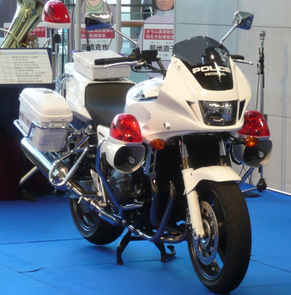 Honda CB1300P.